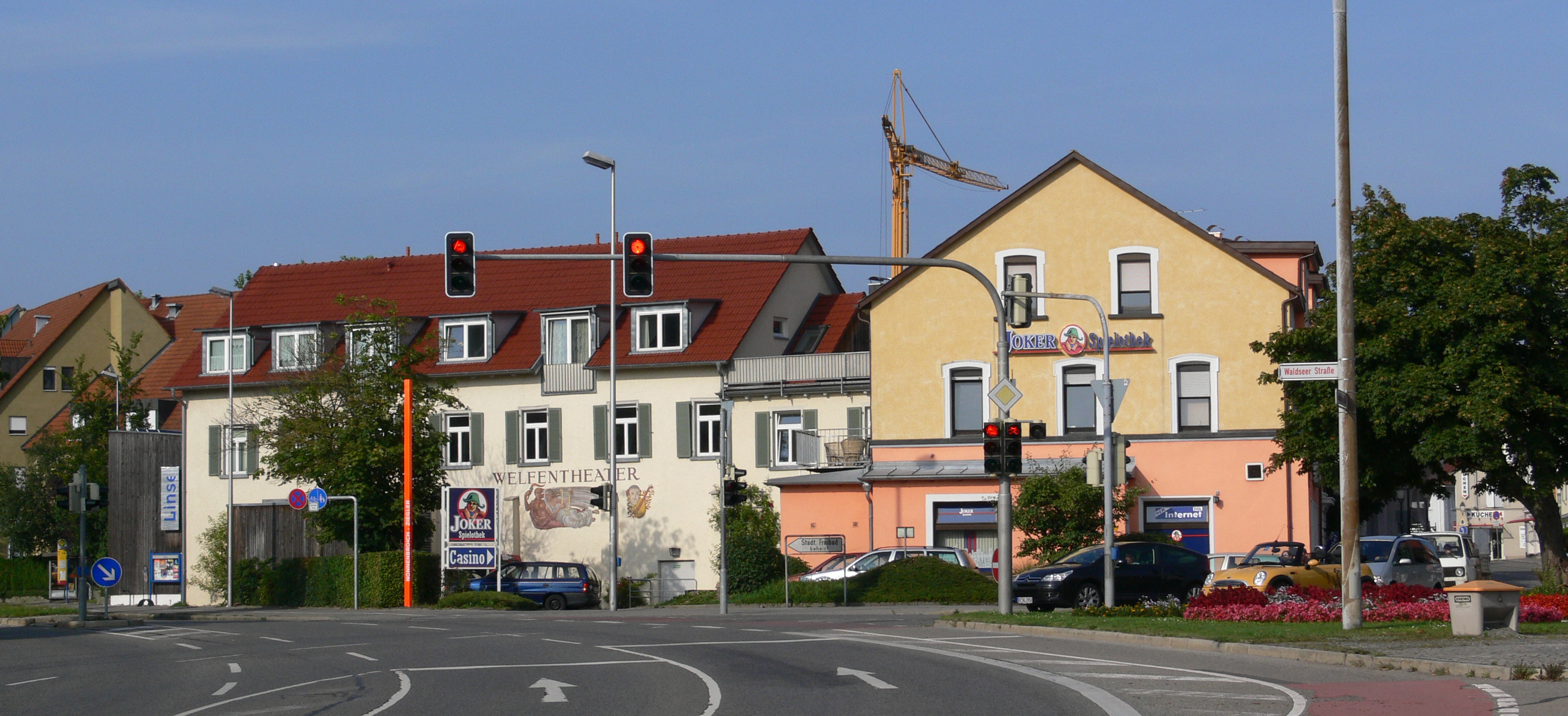 Weingarten (Württemberg), Landkreis Ravensburg Kulturzentrum „Linse“ (Kino und Kleinkunstbühne), ehemaliges „Welfentheater“, Liebfrauenstr. 58 / Waldseer Straße